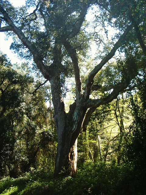 Suro d'en Botifarreta (Tossa de mar, Girona)